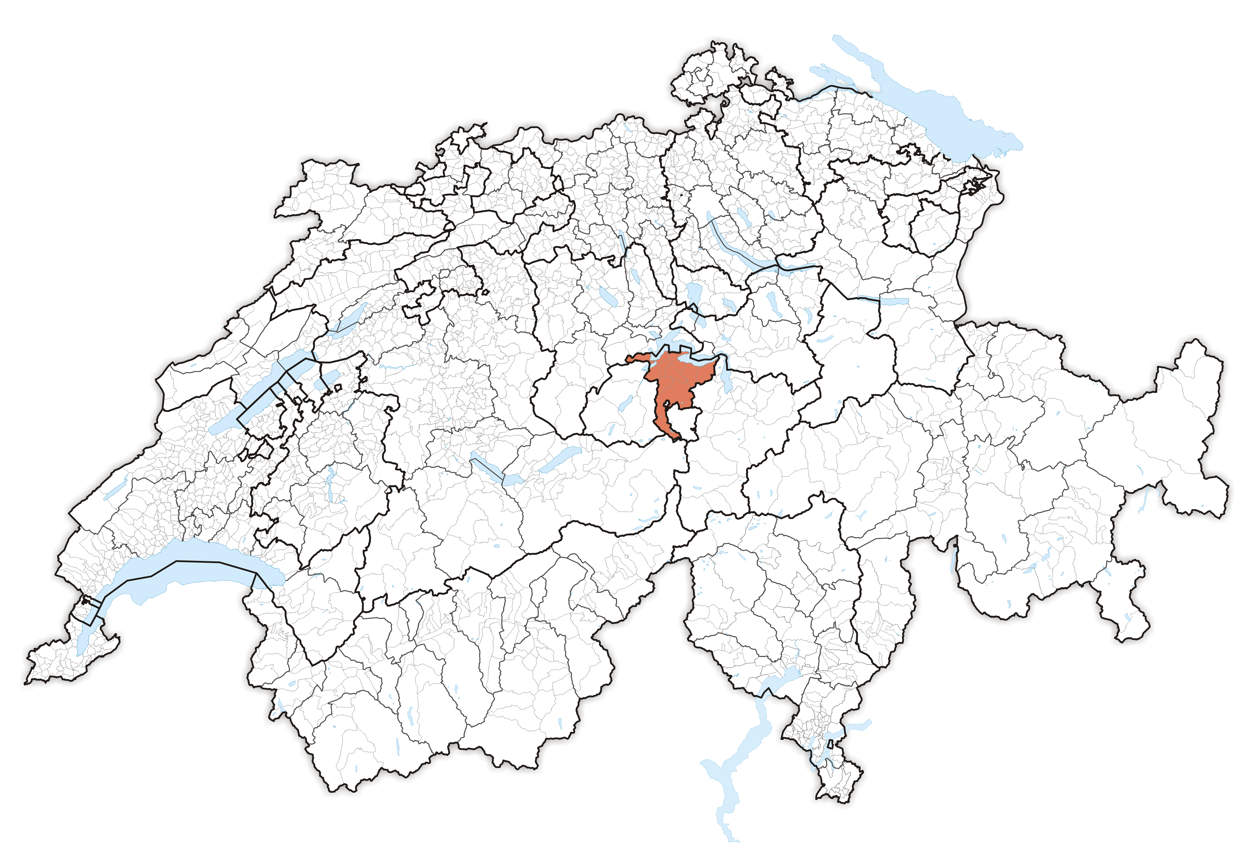 Canton Nidwalden